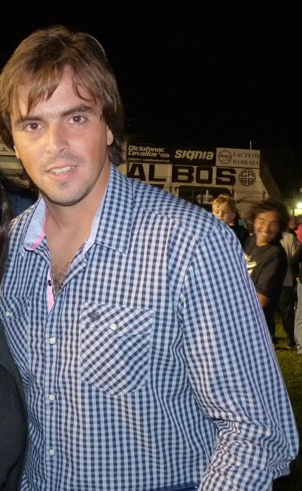 Foto que tomé en una fiesta.